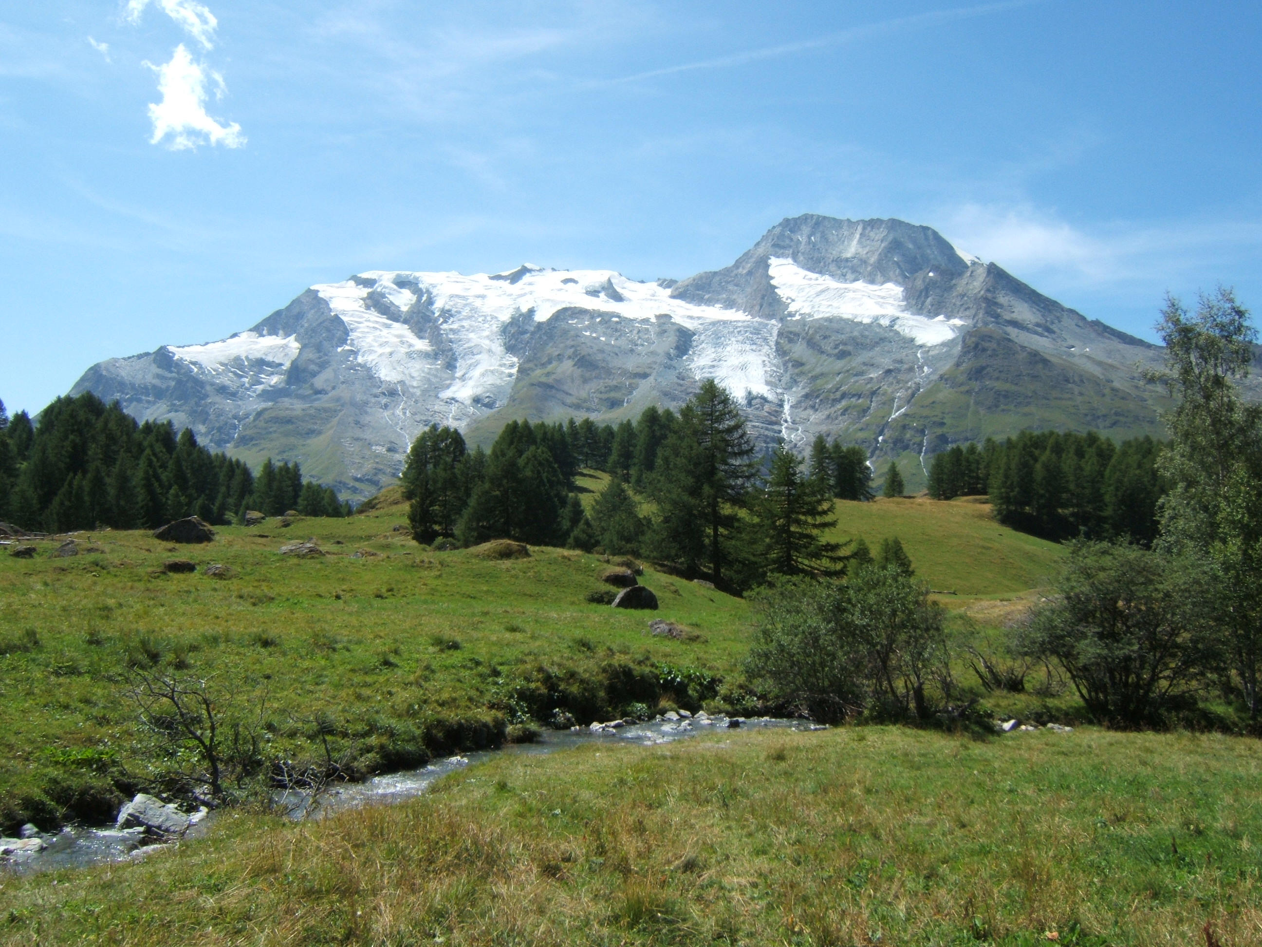 Le hameau du Monal à Sainte-Foy-Tarentaise en Haute-Tarentaise, dans le parc de la Vanoise, en Savoie. En arrière plan, se dresse les faces est du Mont Turia sur la droite du massif et du Mont Pourri au centre (avec la Brèche Puiseux à son pied, côté sud), ainsi que le Dôme de la Sache sur la gauche. Au premier plan, coule paisiblement le ruisseau du Clou.